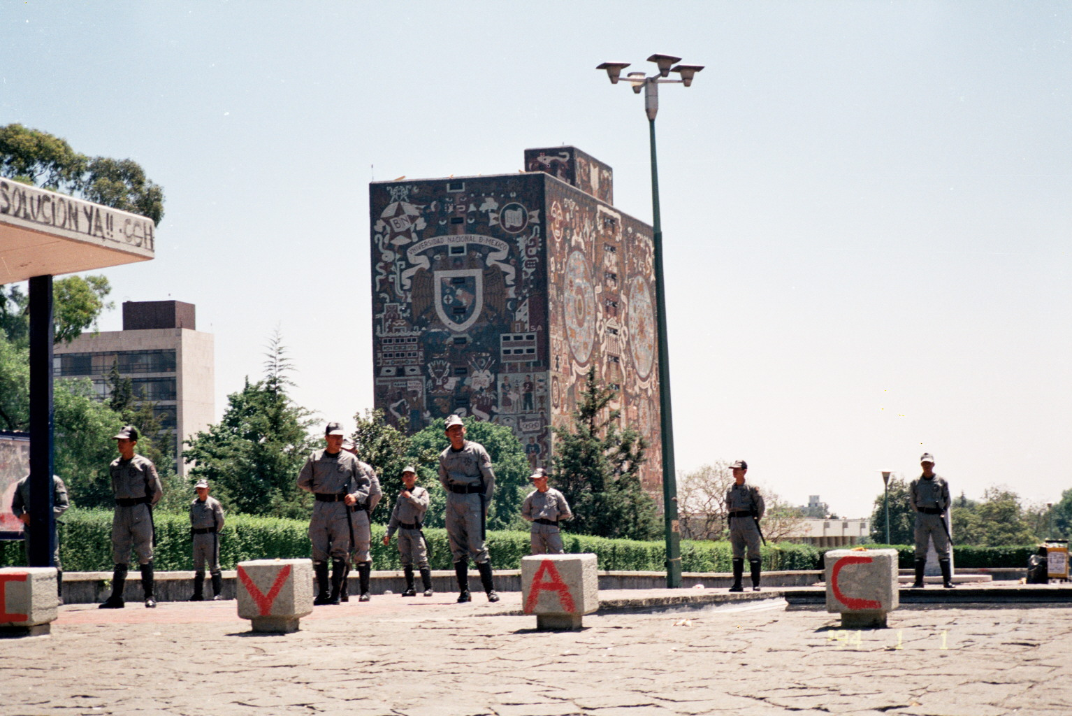 La PFP en las instalaciones de CU. Photo taken in UNAM, CU, Mexico City. Students conflict in 1999-2000. SPANISH: Foto tomada en la UNAM, CU, Ciudad de México. Durante la Huelga del CGH en la UNAM de los años 1999-2000.